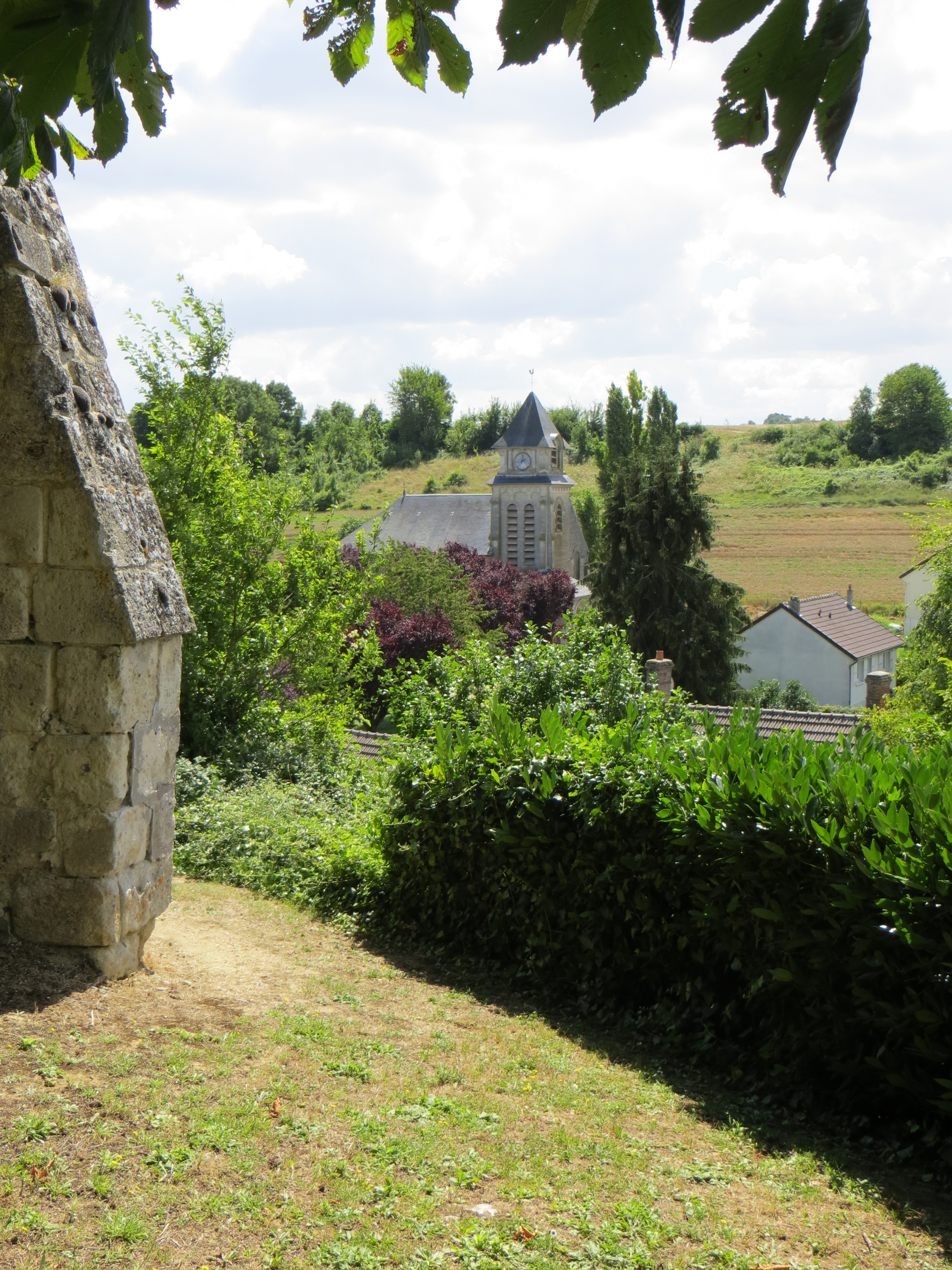 Vue générale de l'église